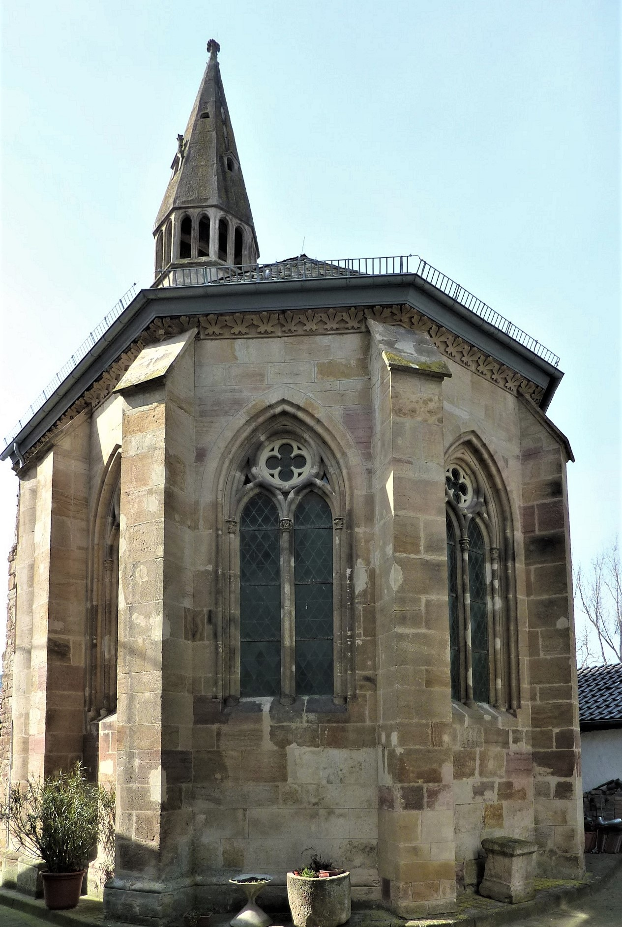 Kapelle, Hof Iben